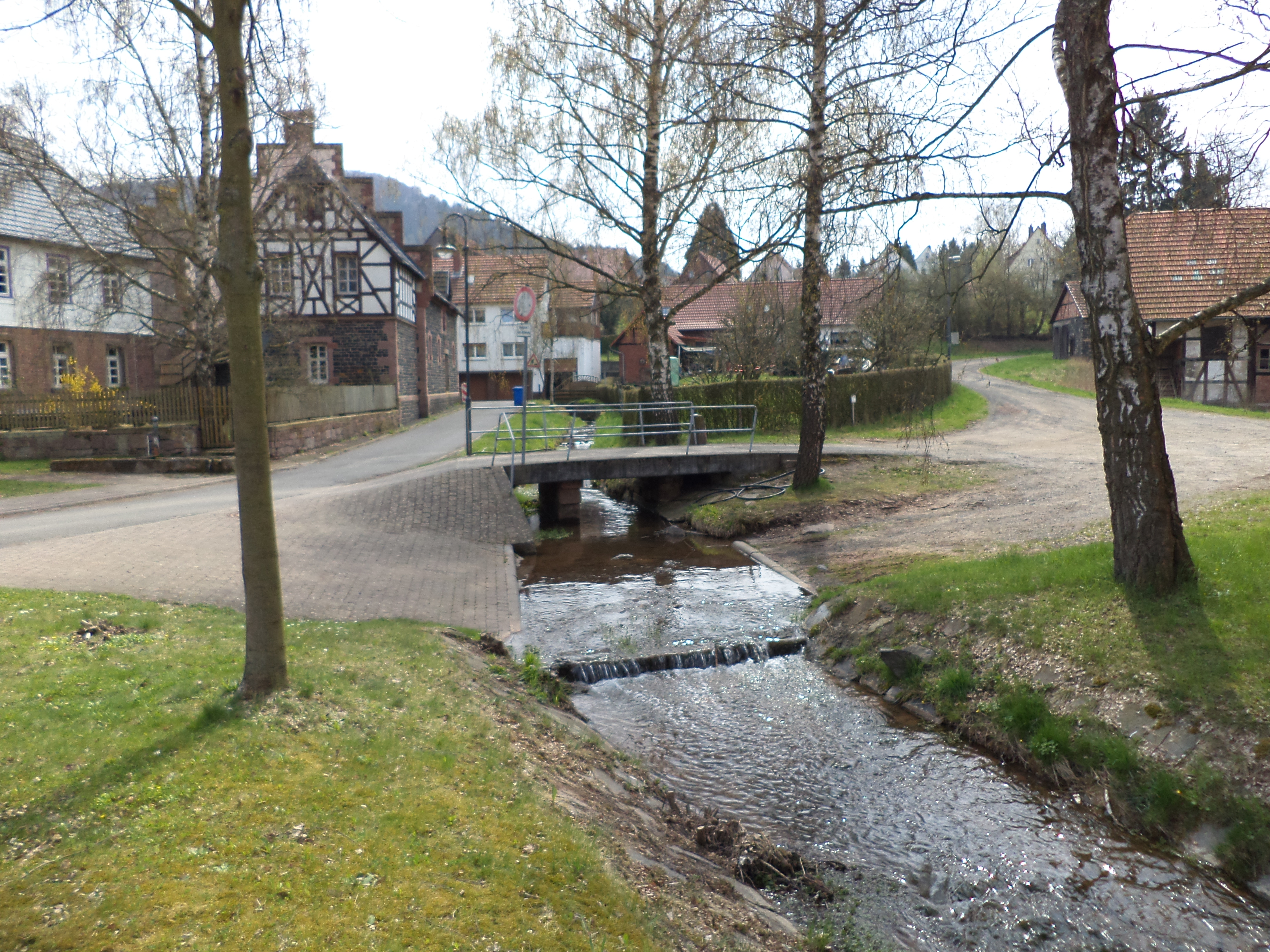 Das Ramholzer Wasser in Vollmerz